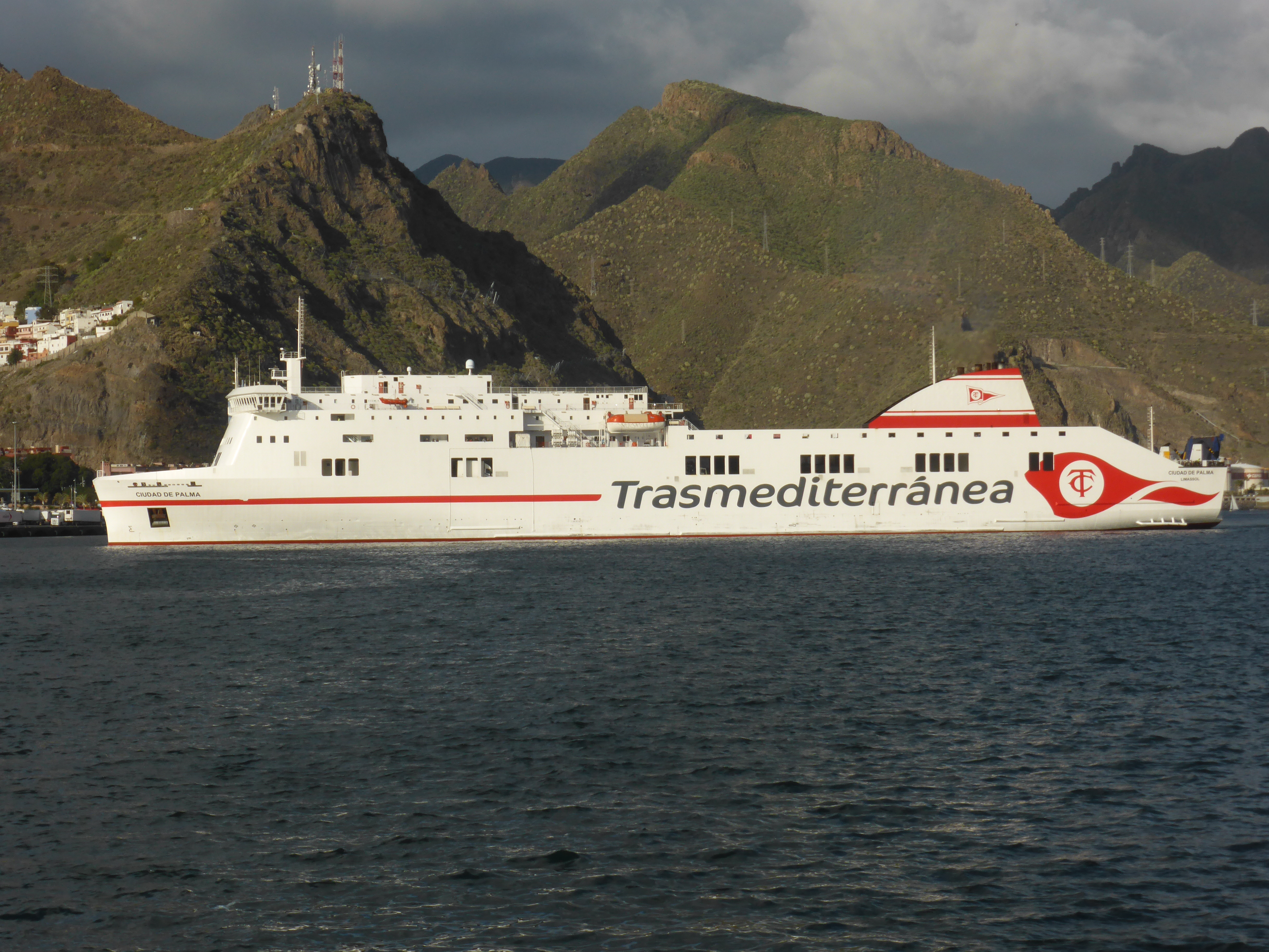 Ferry "Ciudad de Palma", IMO 9349772, de la compañía española "Trasmediterránea". Con matrícula de conveniencia del puerto de Limassol, Chipre. Eslora: 186 metros. Ro-Ro / Buque de pasajeros.